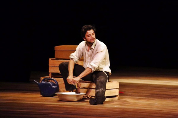 Rodrigo Simas na peça "2 Perdidos Numa Noite Suja" em Agosto de 2016